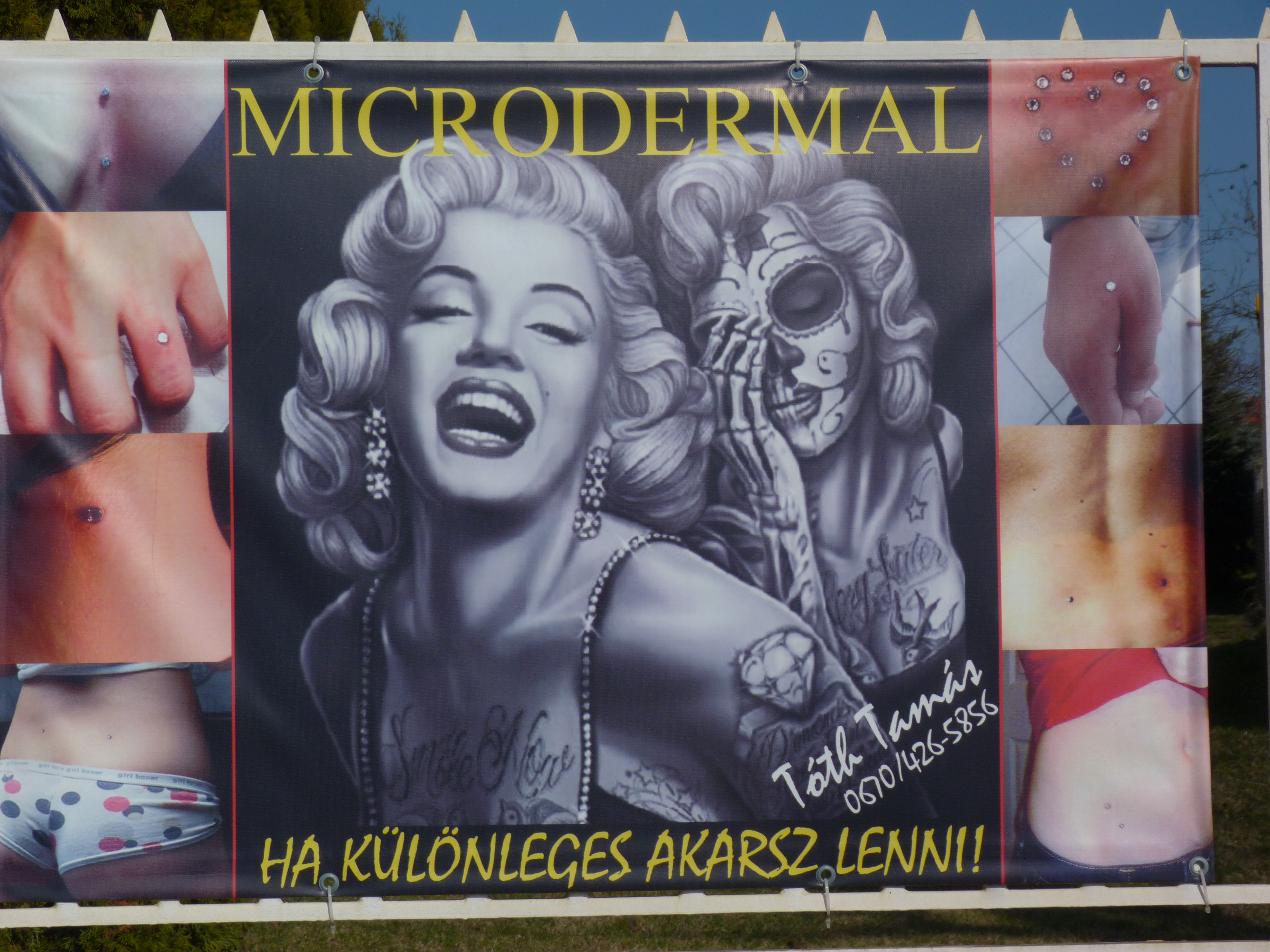 A felvétel 2014. február 26 -án készült Sülysápon. Marilyn Monroe on a fence. (Tattoe shop). ©© Derzsi Elekes Andor, Budapest, 2014, You are authorised to use these photos and vids under Creative Commons – even for commercial, for profit purposes. Photos must be attributed to Derzsi Elekes Andor. All of the photos and vids in the Metapolisz DVD line are under Creative Commons and can be used even for commercial – for profit – purposes. Recommended Citation Derzsi Elekes Andor: Metapolisz DVD line